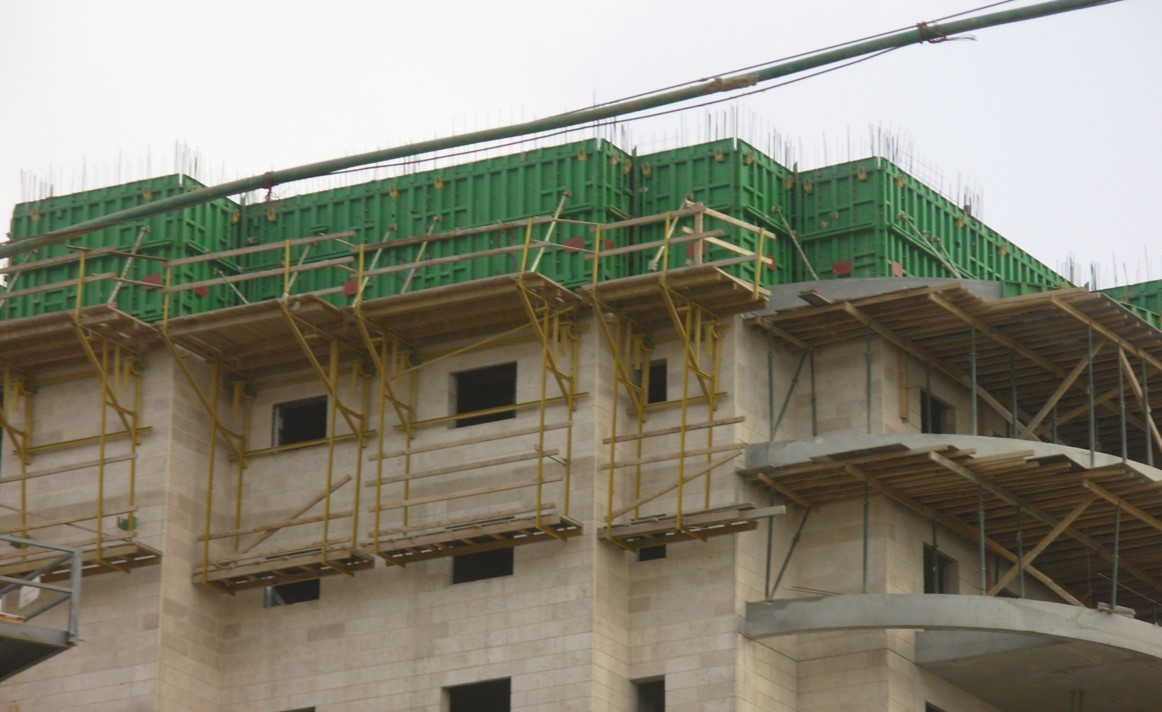 תבניות שבא בפעולה עם במות שרות